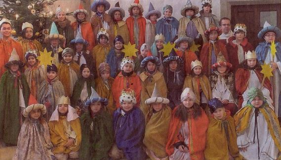 Sternsinger aus Hochfranken